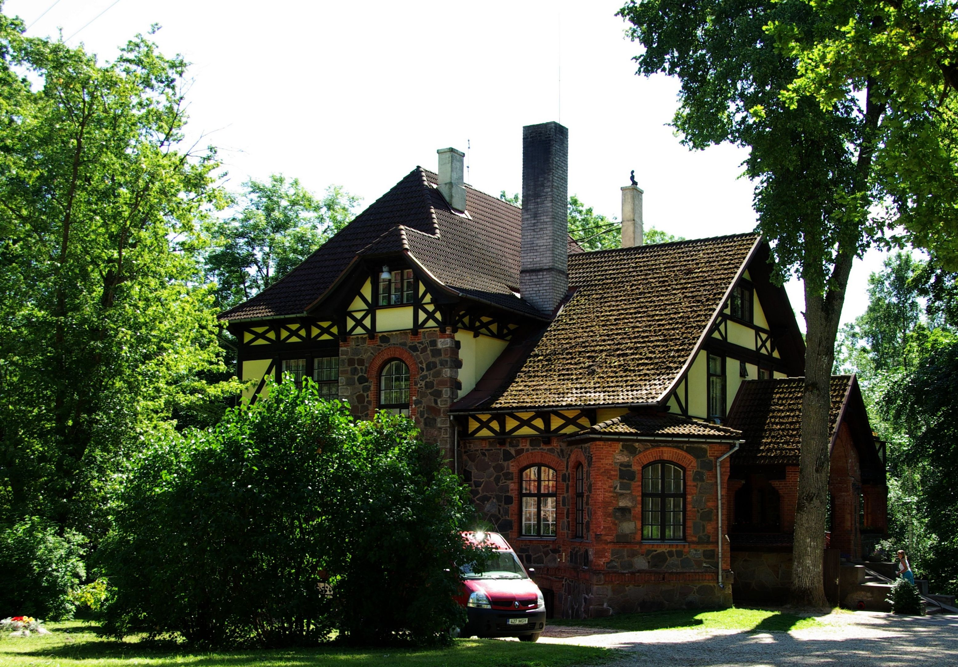 Viljandi maakond, Saarepeedi vald, Peetrimõisa küla